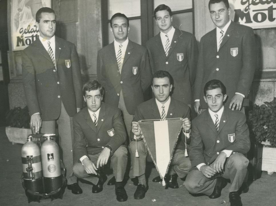 Franco Pavone (al centro) e la prima nazionale italiana di nuoto pinnato, Russia, 1965.